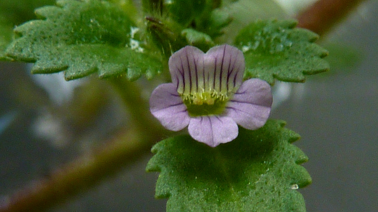 Stemodia verticillata (Mill.) Hassl.